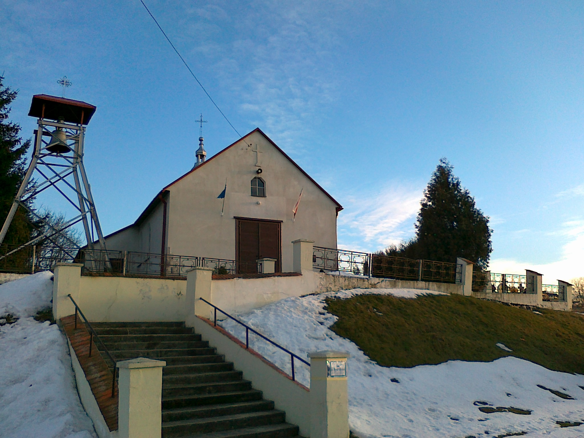 Parafia Kościoła Polskokatolickiego św. Cyryla i Metodego w Dąbrówce